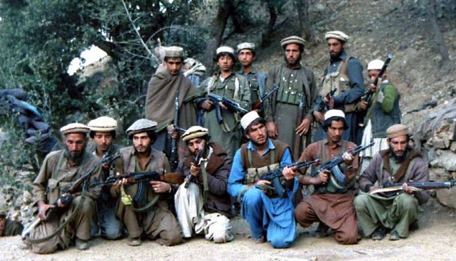 Mujahideen loyal to Yunus Khalis, Afghanistan